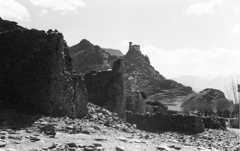 Tibetexpedition, Landschaftsaufnahme, Yumbu Lagang Ombulakhang mit Landschadt [Yarlungtal; Yumbu Lagang]